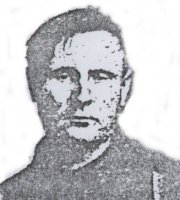 Элмер Маккёрди на армейской службе